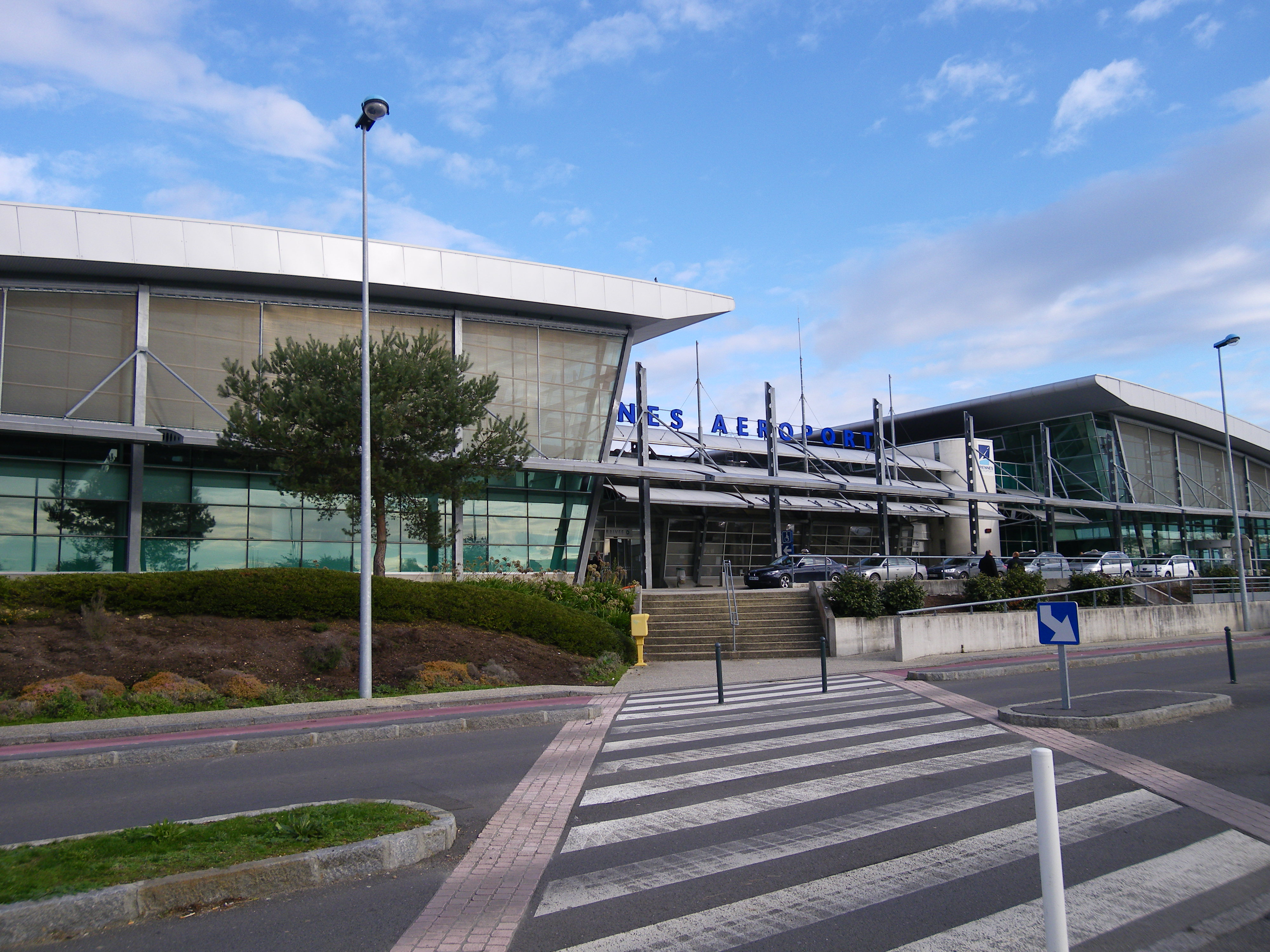 l'aeroport de rennes st jacques